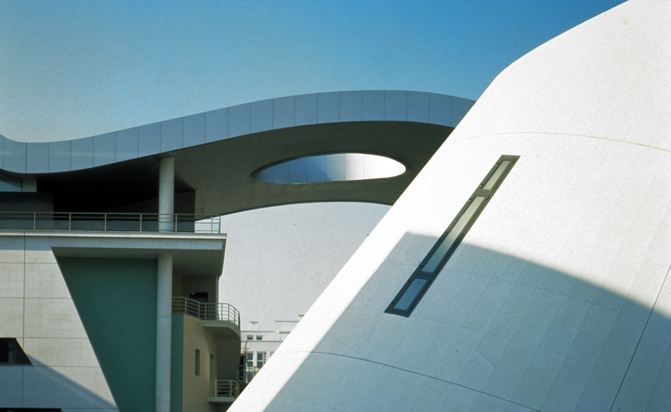 La cité de la musique, Atelier Christian de Portzamparc